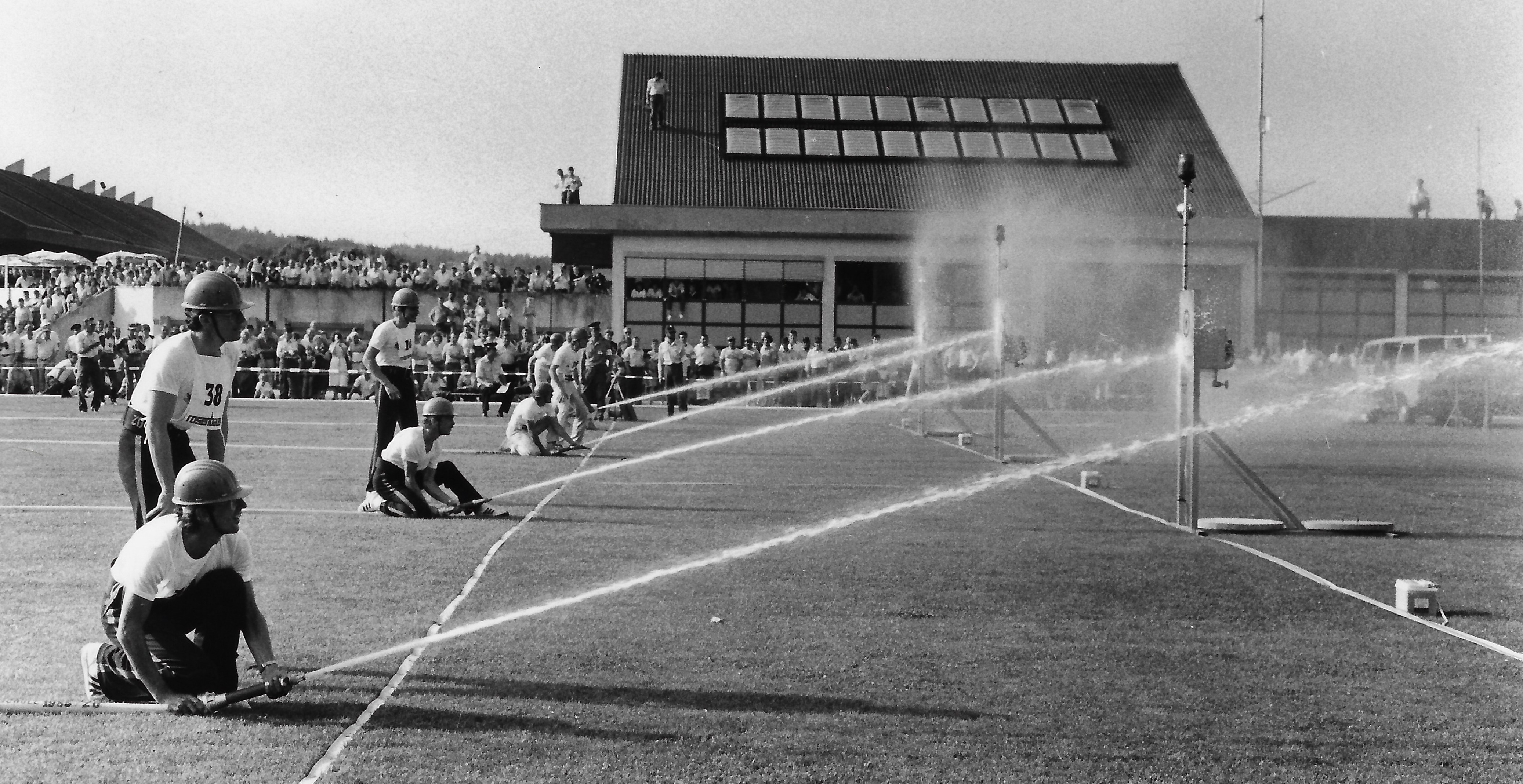 VII. Internationale Feuerwehrsportwettkämpfe 1985 in Vöcklabruck/Österreich, Disziplin Löschangriff - Freiwillige Feuerwehren